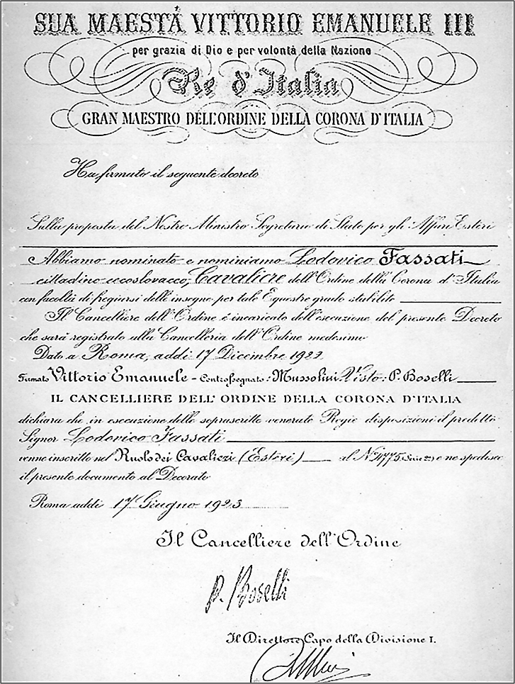 reprodukce jmenovací listiny titulu "Cavaliere"